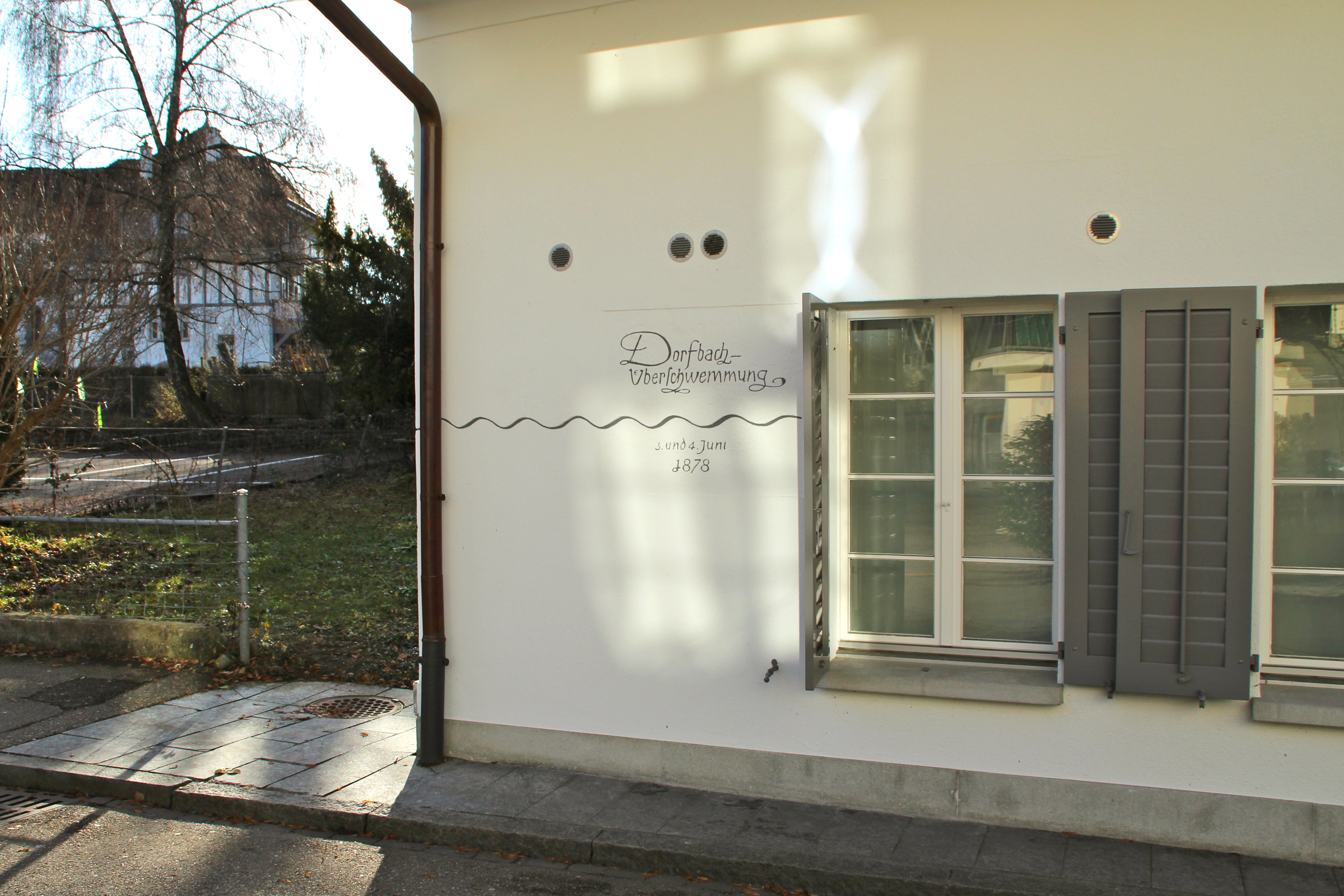 Hochwasseranzeige der Küsnachter Überschwemmung 1878